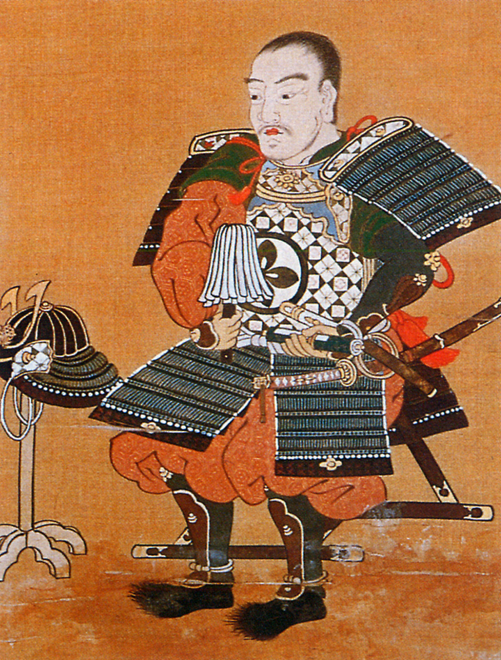 太田道灌 Outa Doukan.